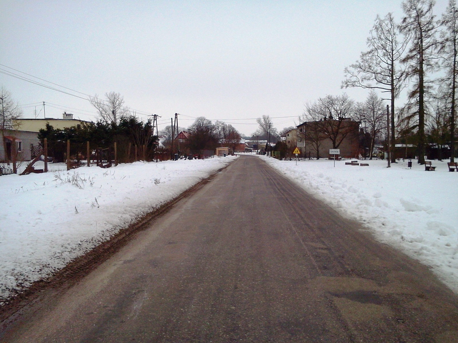 Widok na Unimie